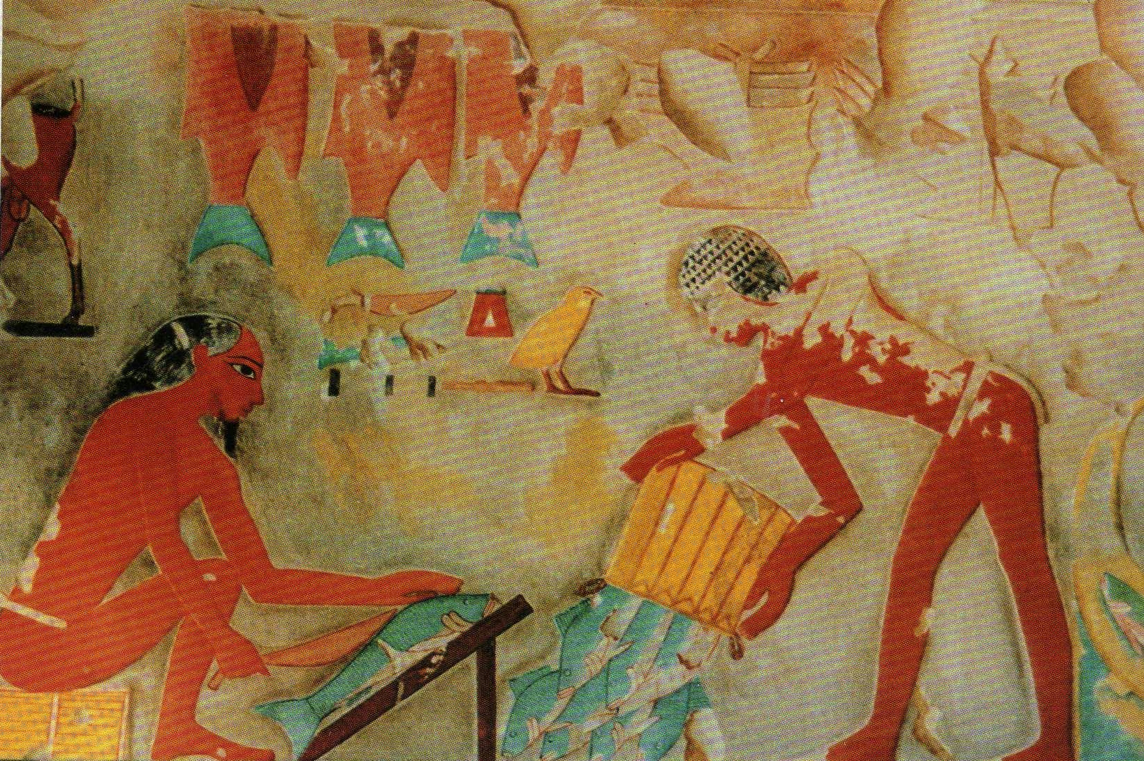 Das Ausnehmen von Fischen in einer Wandmalerei des Grabes des Puiemrê in Theben